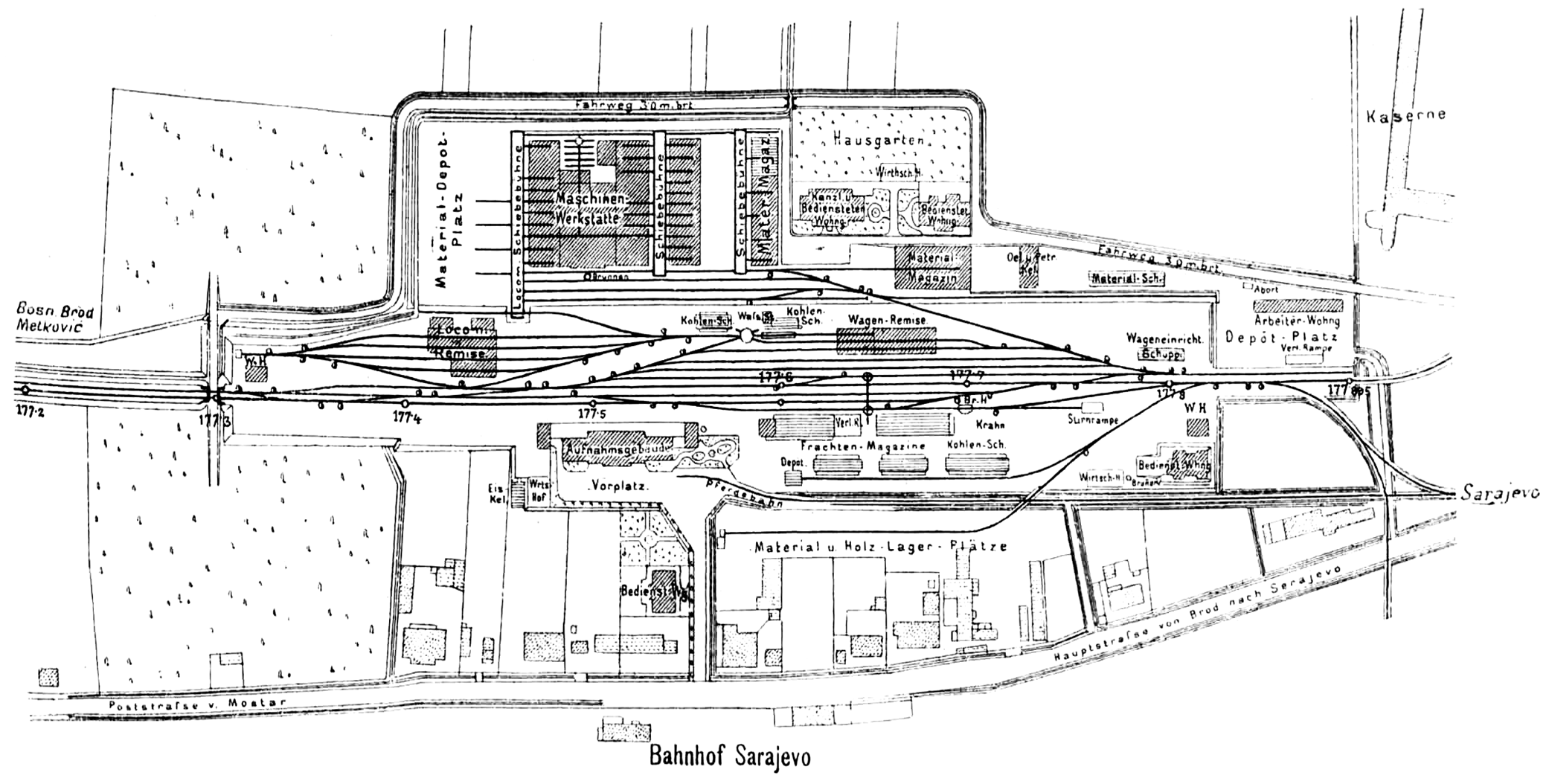 Gleisplan des damaligen Schmalspurbahnhofs Sarajevo